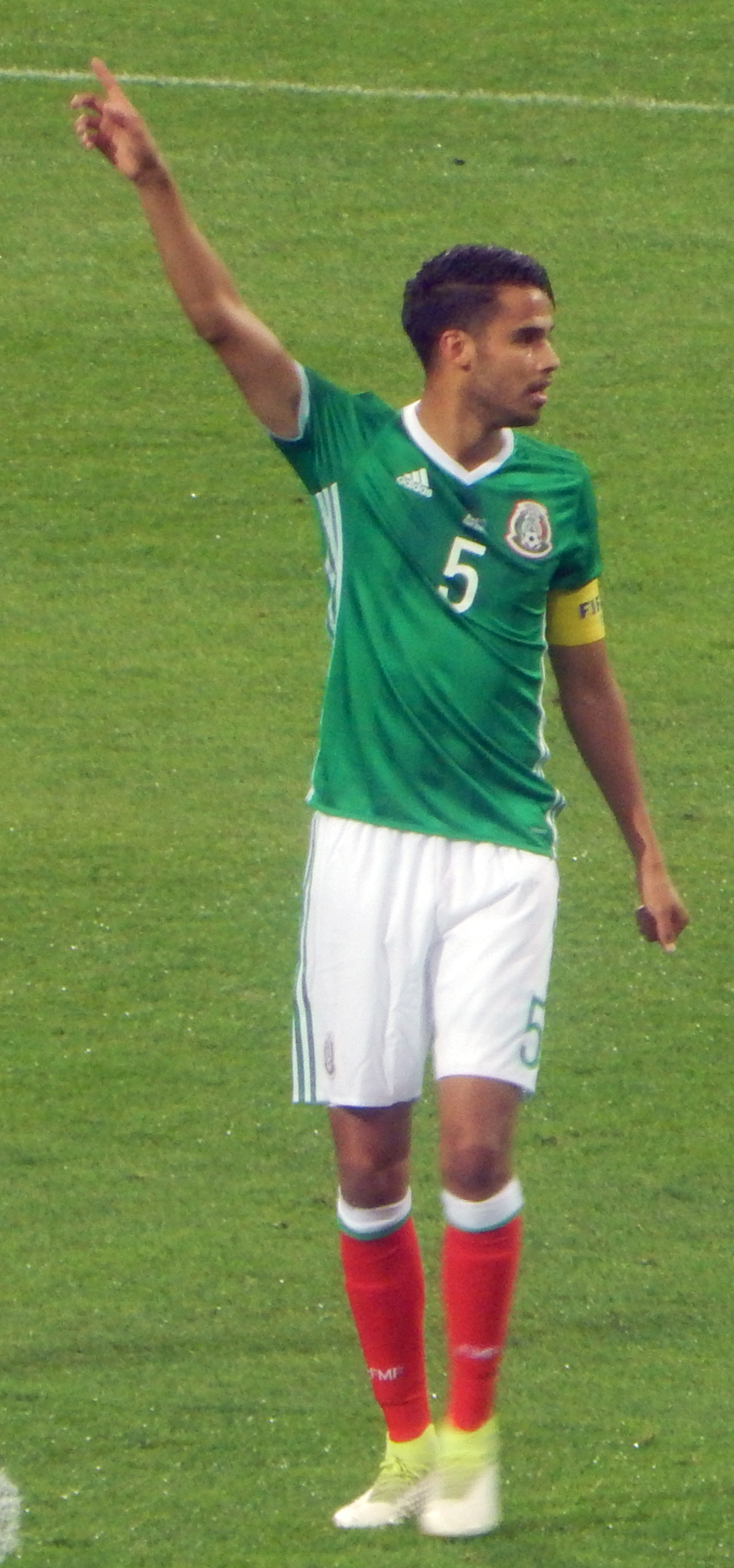 Диего Рейес в матче против сборной Новой Зеландии